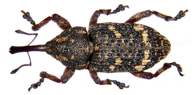 Familie: Curculionidae Groesse: 6,2-8,5 mm Verbreitung: Europa Ökologie: Entwicklung unter der Rinde von Nadelhölzern Fundort: Germania, Bayern, Oberfranken, Selbitz leg.det. U.Schmidt, 2003 Foto: U.Schmidt, 2005